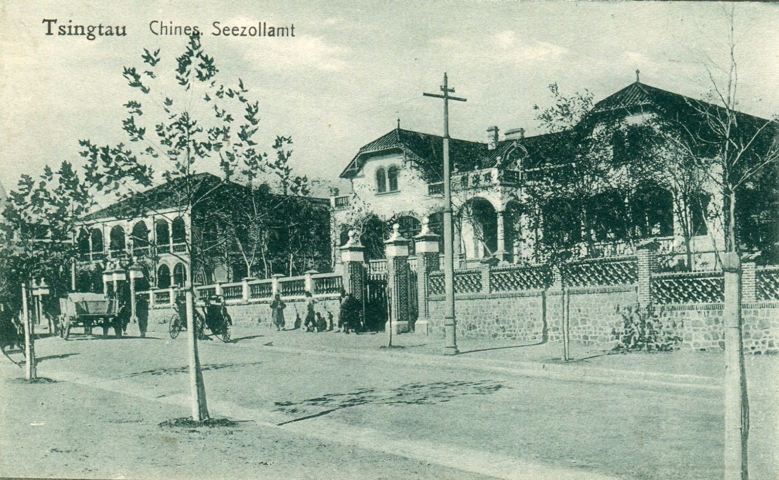 青岛胶海关早期建筑